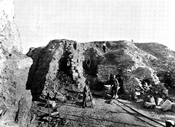 Фото раскопок Шлимана в Трое. Судя по узкоколейной дороге с вагонетками, сделано не ранее 1890 года